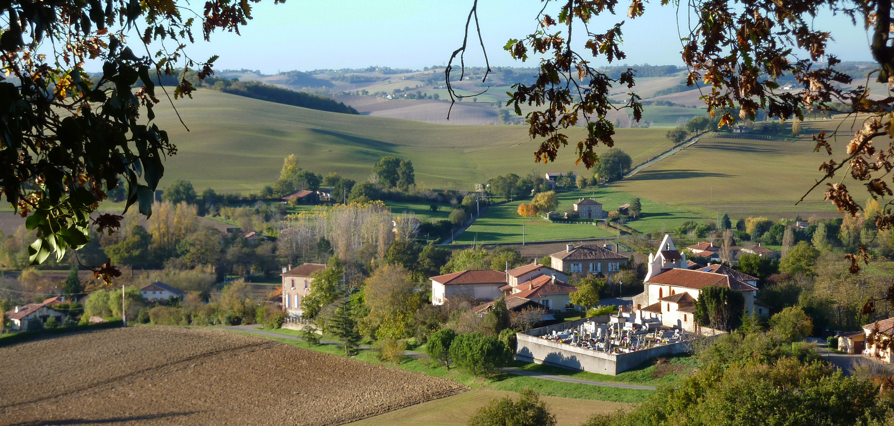 Village